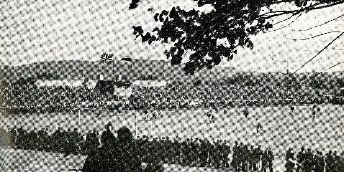 Sandefjord Ballklubb på Stadion